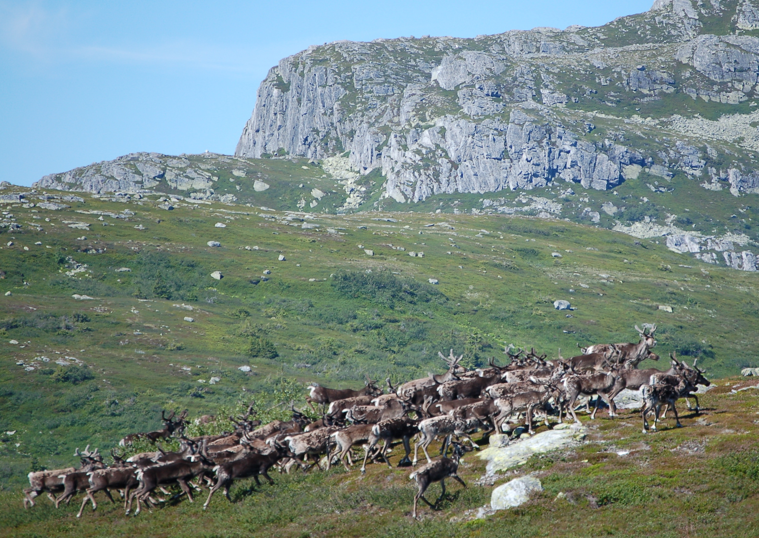 Villrein på Blefjell - under Åklinut.